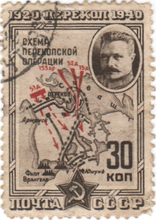 Почтовая марка СССР - Перекопская операция